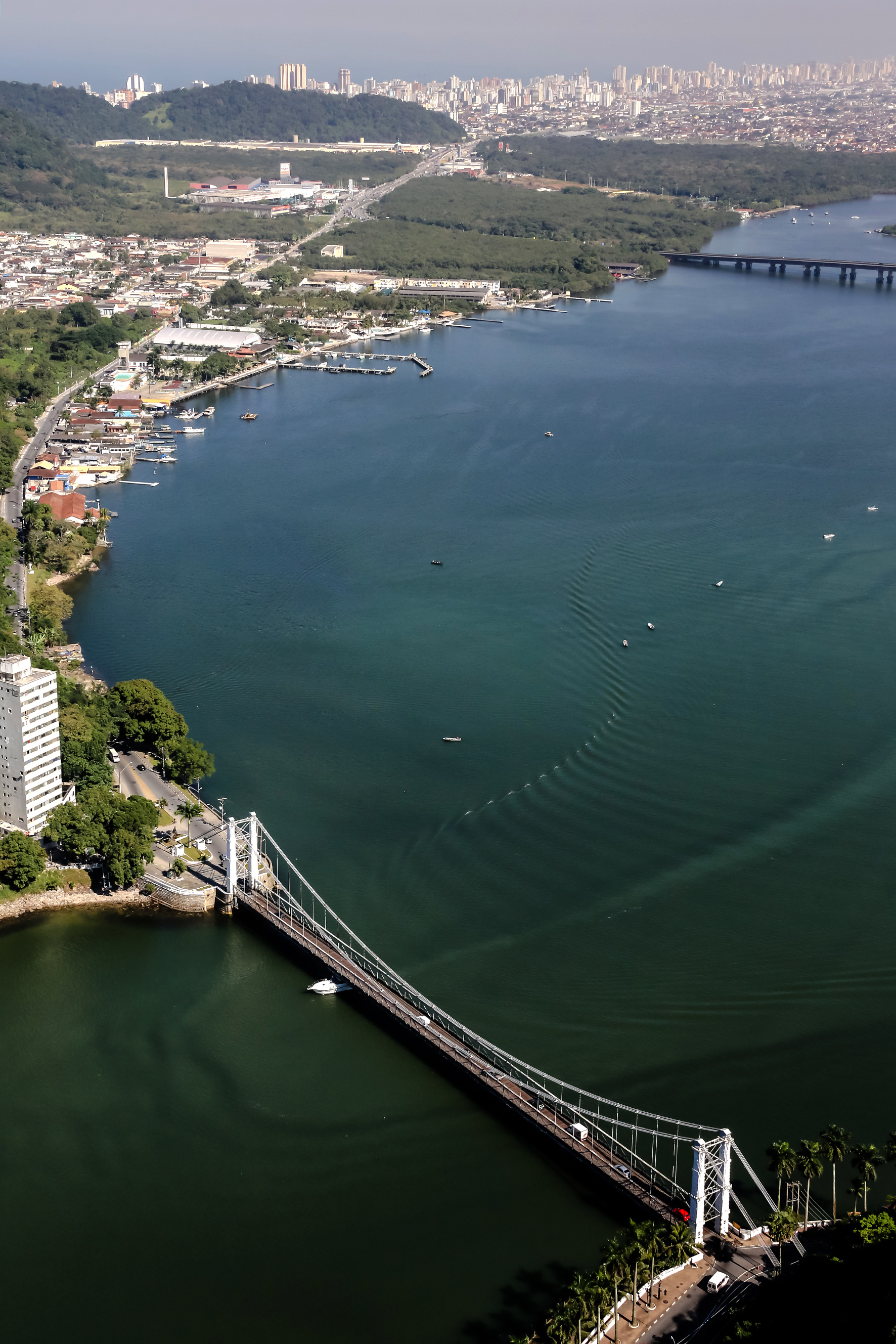 Ponte Pênsil